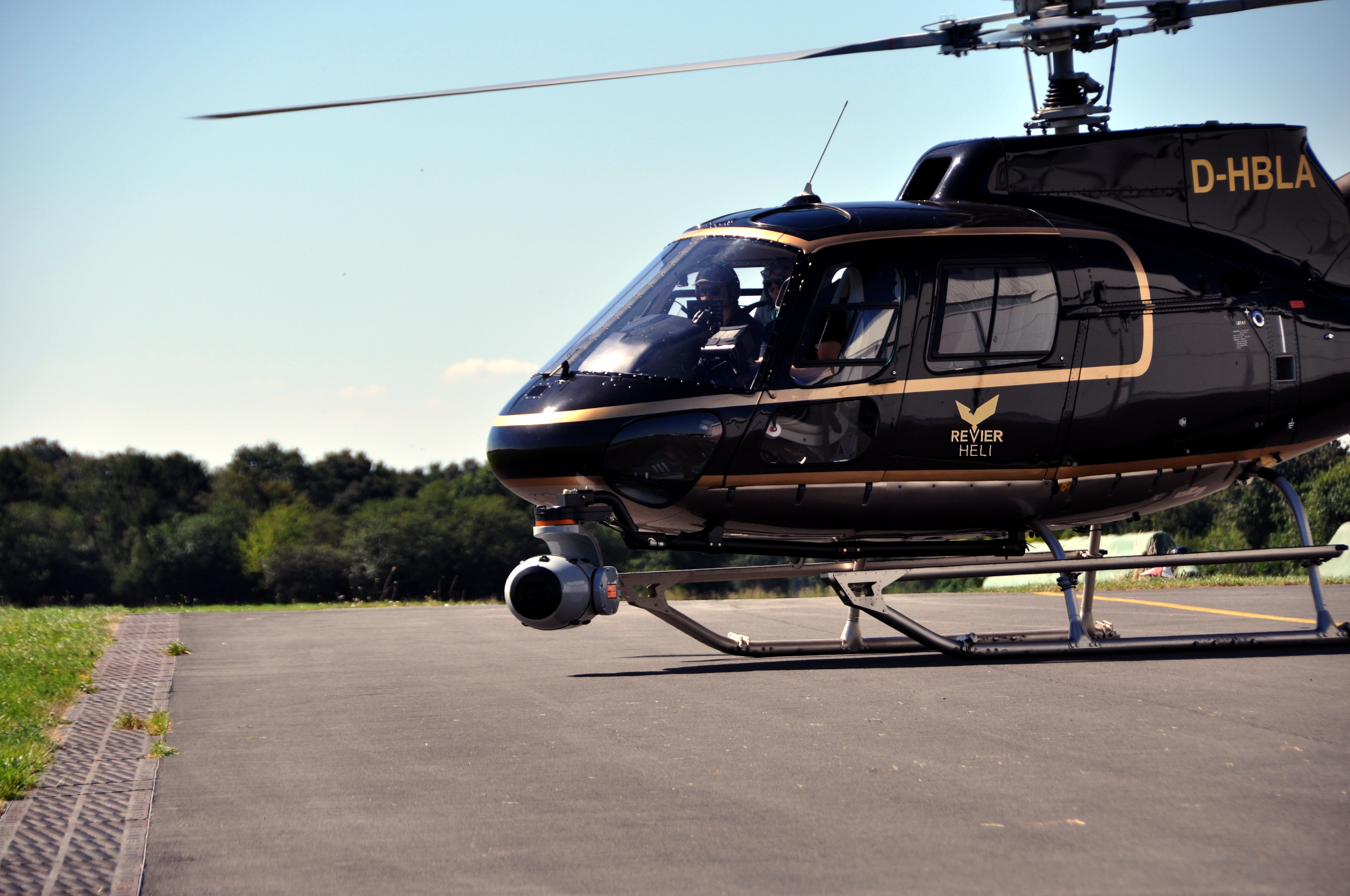 Filmflüge mit Kameramount am Airbus Helicopter AS350B3+ von der Firma Revierheli